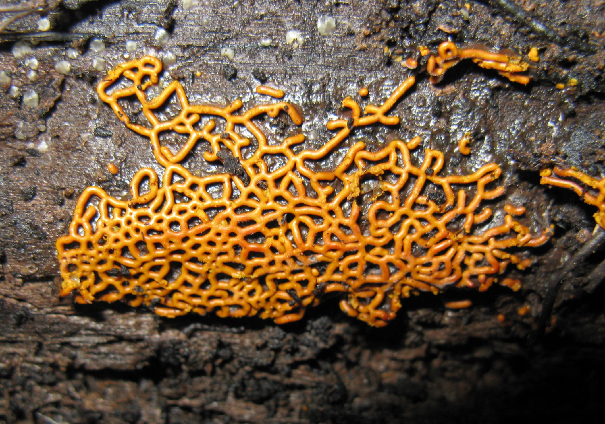 Hemitrichia serpula Notes: Hemitrichia serpulaCommon name: Pretzel Slime